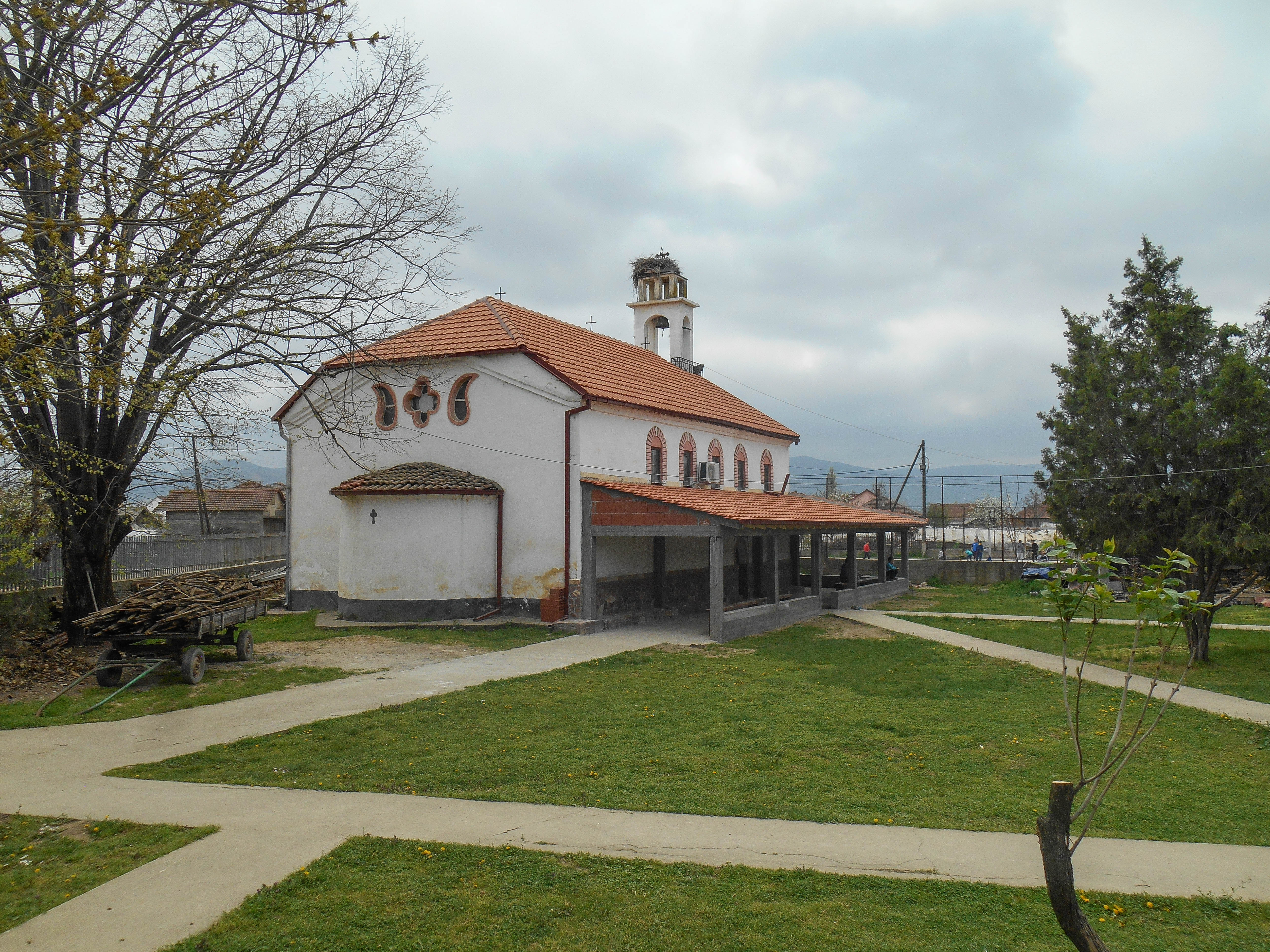 Црквата Свети Илија во Добрејци